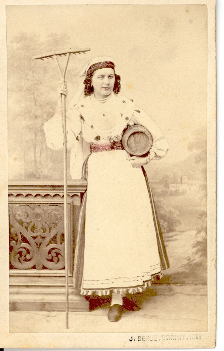 Lydia Koidula